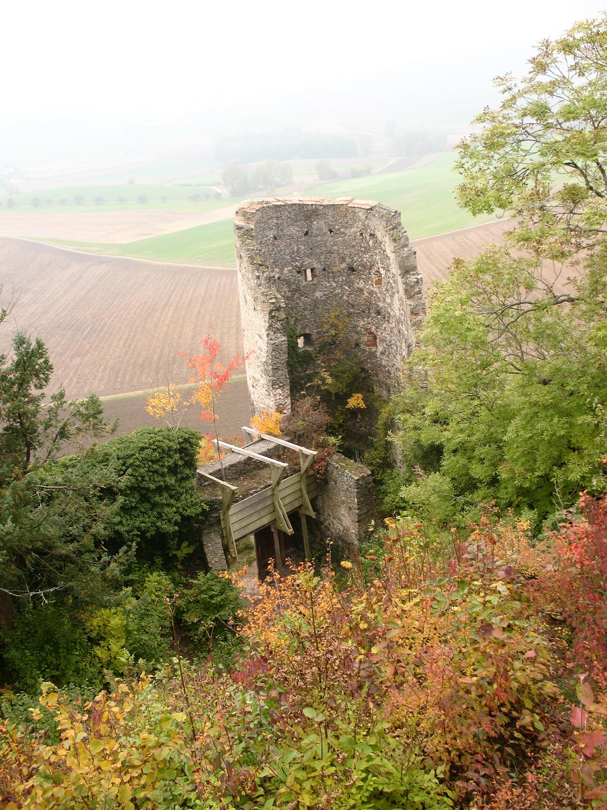 Blick von Innen auf den Turm neben dem Eingangstor